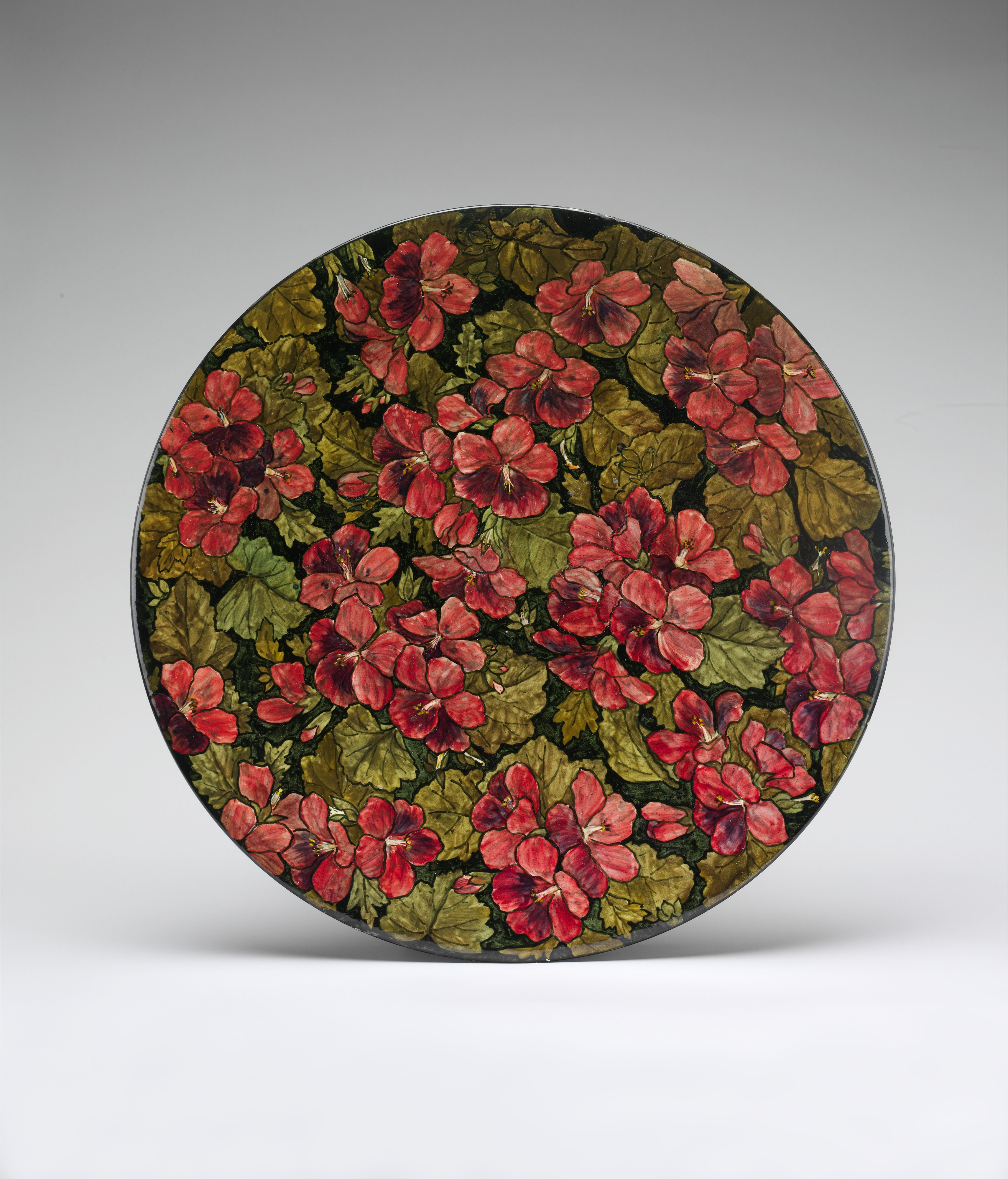 American; Plaque; Ceramics